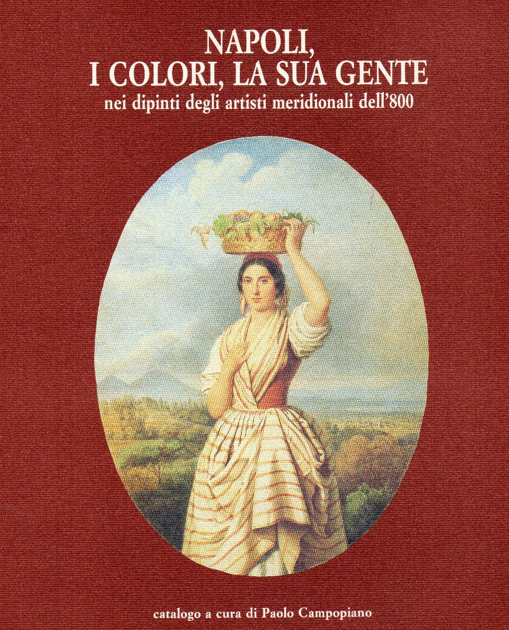 Catalogo della Esposizione a Castelfranco Veneto presso casa del Giorgione dal 30.11.1991 al 19.12.1991. Creato con scanner in data odierna da originale in mio possesso (esemplare 327)